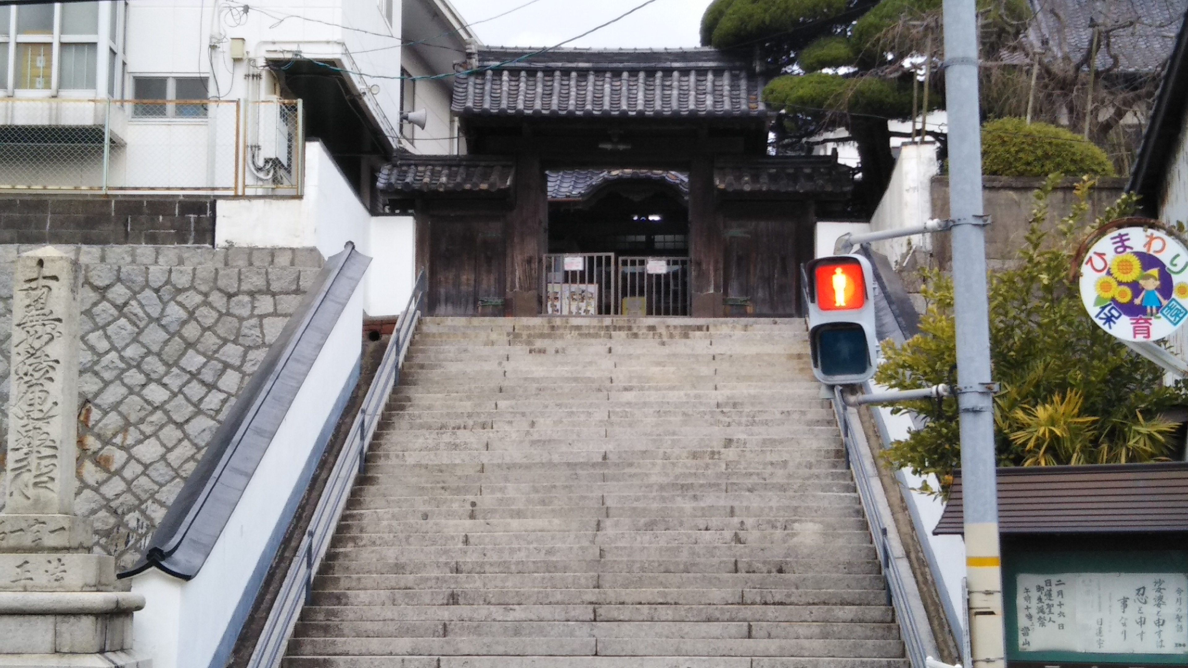 下関市長崎町法正院入口